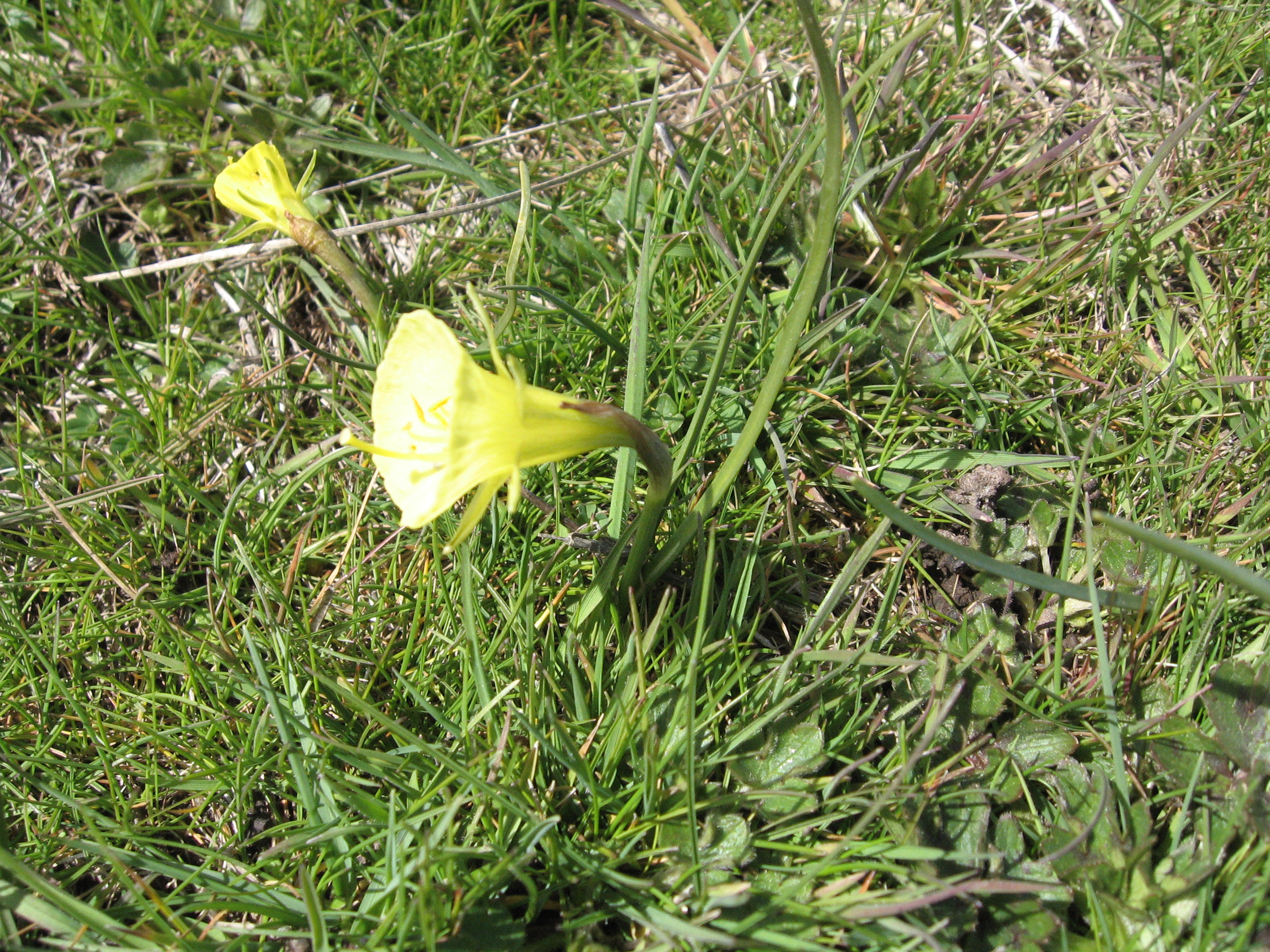 Narcissus bulbocodium subsp. graellsii, (= N. graellsii). España, Segovia, pr. El Olmo, en prados.